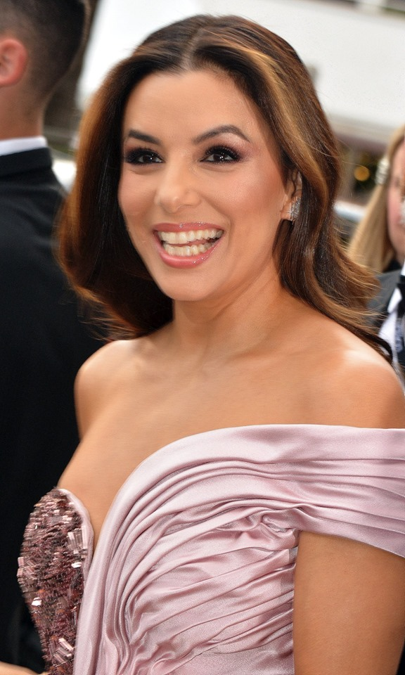 Eva Longoria au Festival de Cannes 2019.